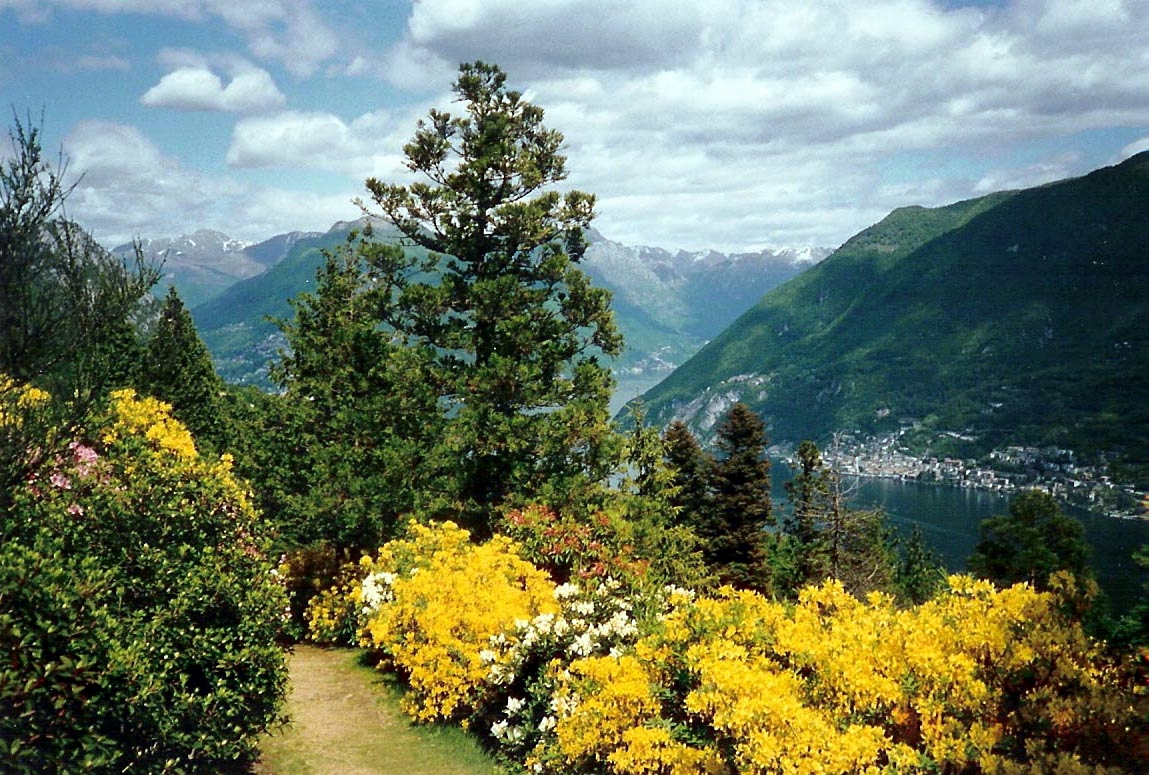 Paradiso TI: Parco San Grato oberhalb von Carona. Blick nach Norden zum Monte Brè. Mitte rechts der nordöstliche Seearm und die italienische Enklave Campione d’Italia.